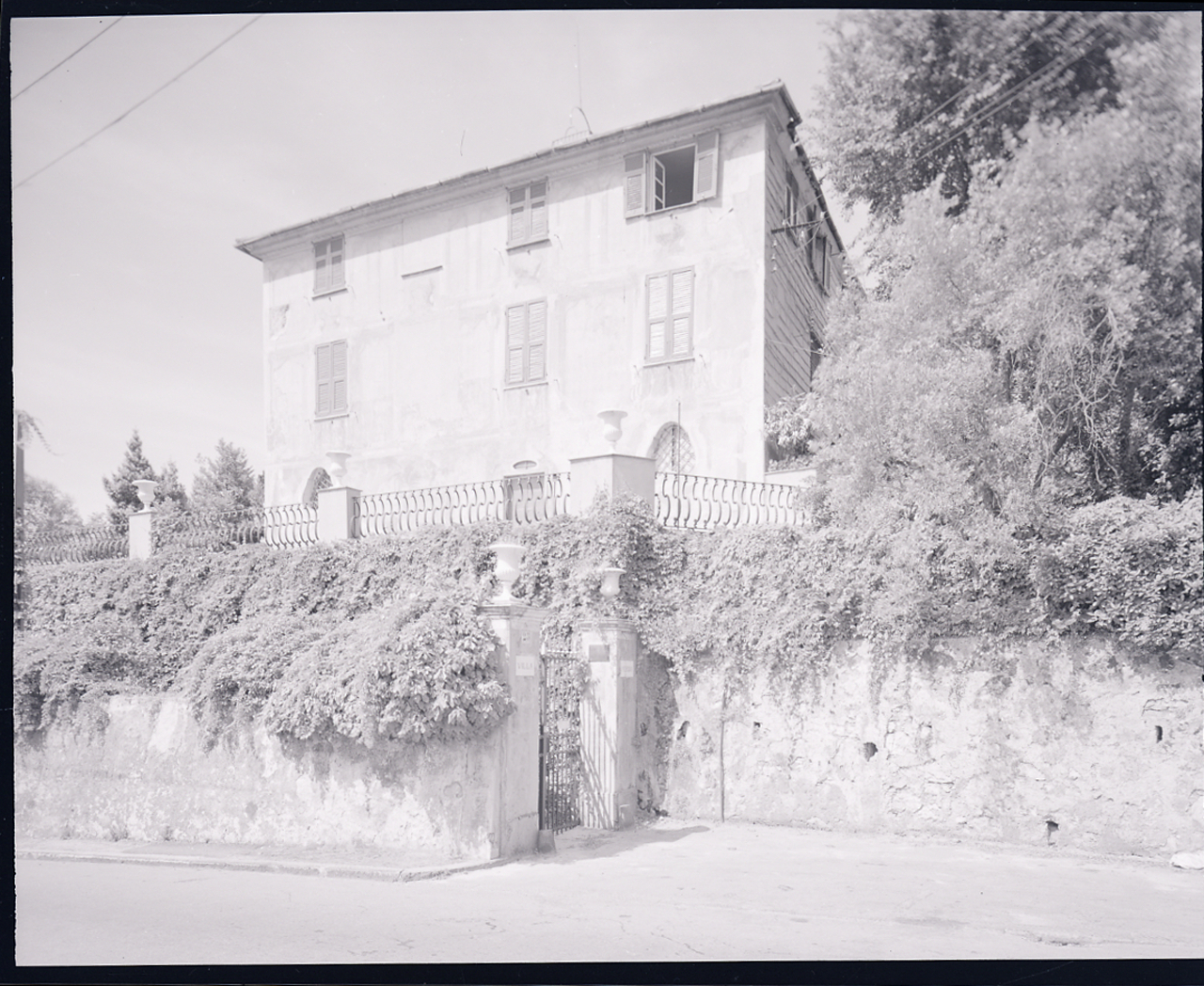 Servizio fotografico : Genova, 1963 / Paolo Monti. - Buste: 2, Fototipi: 2 : Negativo b/n, gelatina bromuro d'argento/ pellicola ; 10x12. - ((Serie costituita da 2 buste sciolte di negativi identificati con i nn.: 6541, 6542. - Il negativo identificato con il numero 46397 è stato realizzato per Zodiac. - Occasione: Documentazione per la pubblicazione: Italia Nostra (a cura di), "Le ville genovesi", catalogo della mostra, Genova 1962, Genova, Comune di Genova, 1967. - Fonte: Monografia di Italia Nostra (a cura di): Le ville genovesi, catalogo della mostra, Genova 1962, Genova, Comune di Genova (1967). - Fonte: Lettera di Paolo Monti: I. Carteggi/ Genova - Enrico (1963-1966), presso Archivio Paolo Monti. Camicia con documenti dattiloscritti e manoscritti vari relativi al lavoro eseguito per Italia Nostra: preventivi, lettere, inventari. - Fonte: Rubrica di Paolo Monti: Archivio fino 1-4-1961/ 31-3-1963 (1961-1963), presso Archivio Paolo Monti. - Fonte: Agenda di Paolo Monti: R 1 - Monti/ 1 aprile 1963 - 6 giugno 1964/ 6000-8193 (1963-1964), presso Archivio Paolo Monti